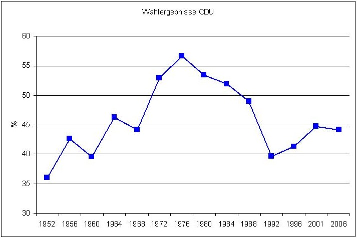 Wahlergebnisse CDU BW